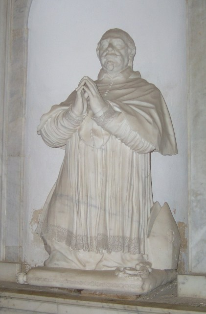 Monumento funebre di mons. Fabio de Lagonissa - Cappella della Schiodazione - Chiesa dell'abbazia di Montevergine